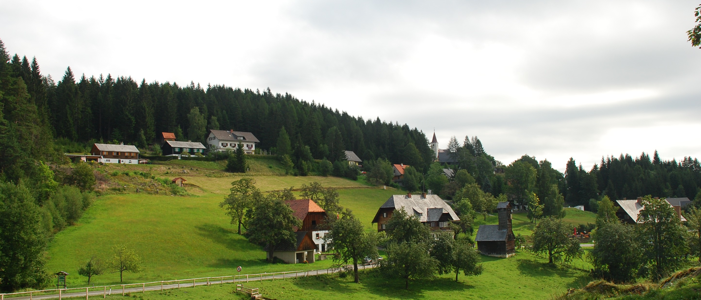 St. Oswald in Freiland, vom Marxbauer aus